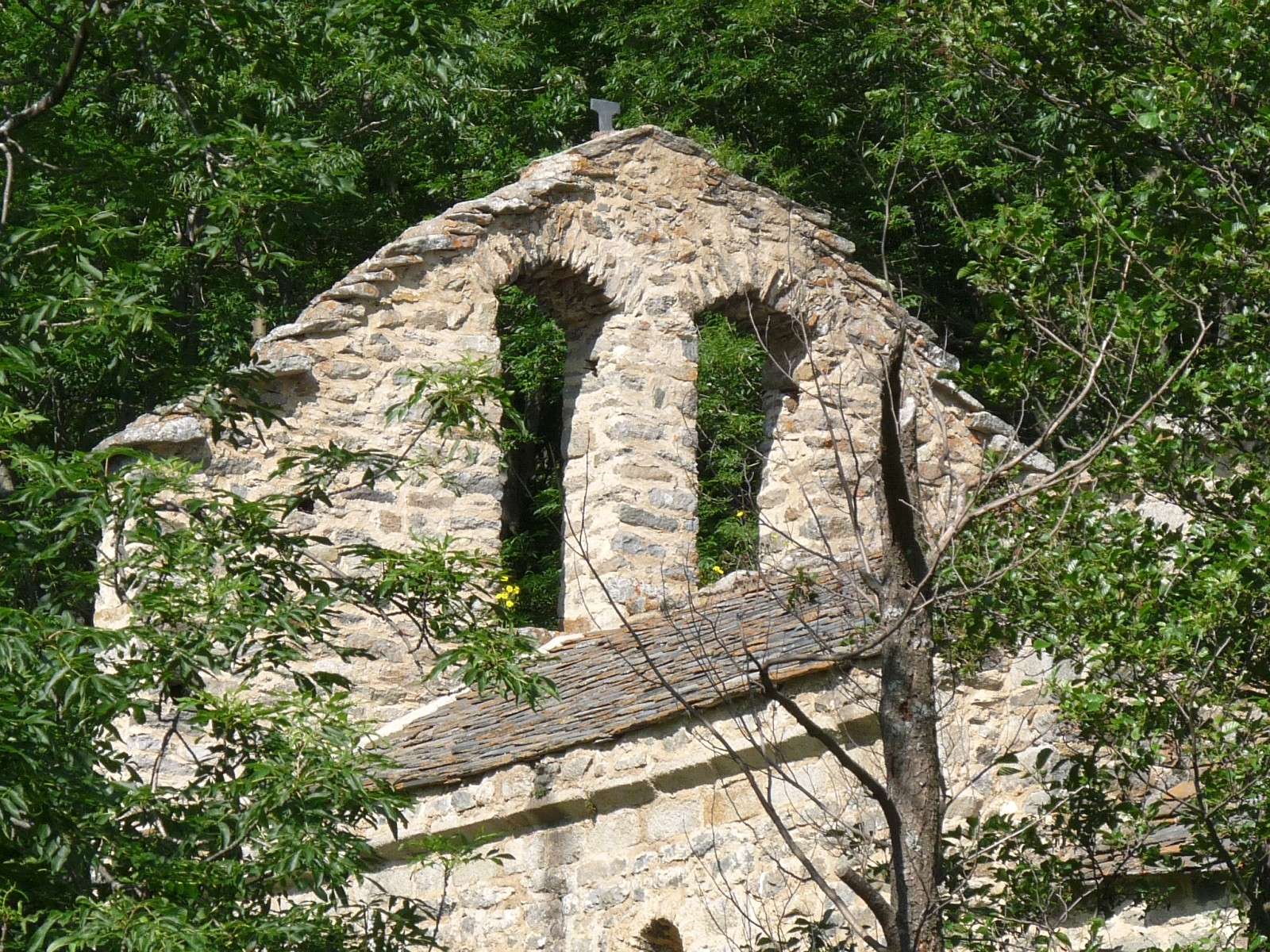 Chapelle St-Martin d'Envalls, Pyrénées-Orientales, France